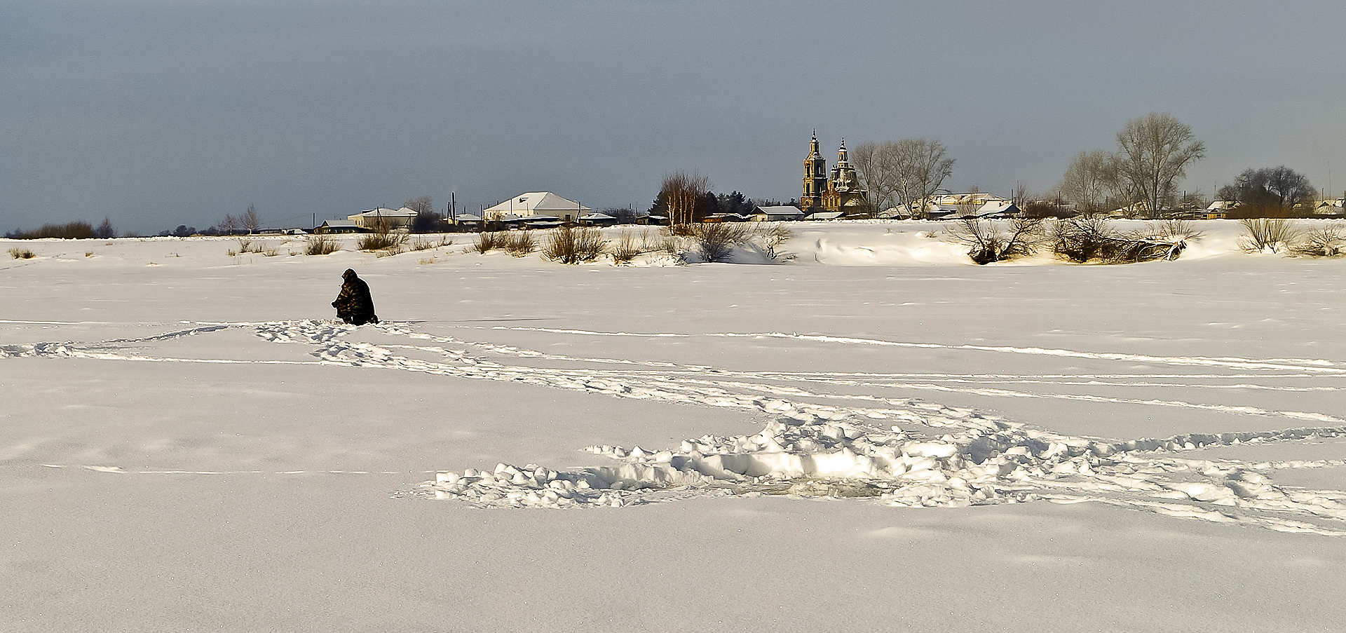 Церковь